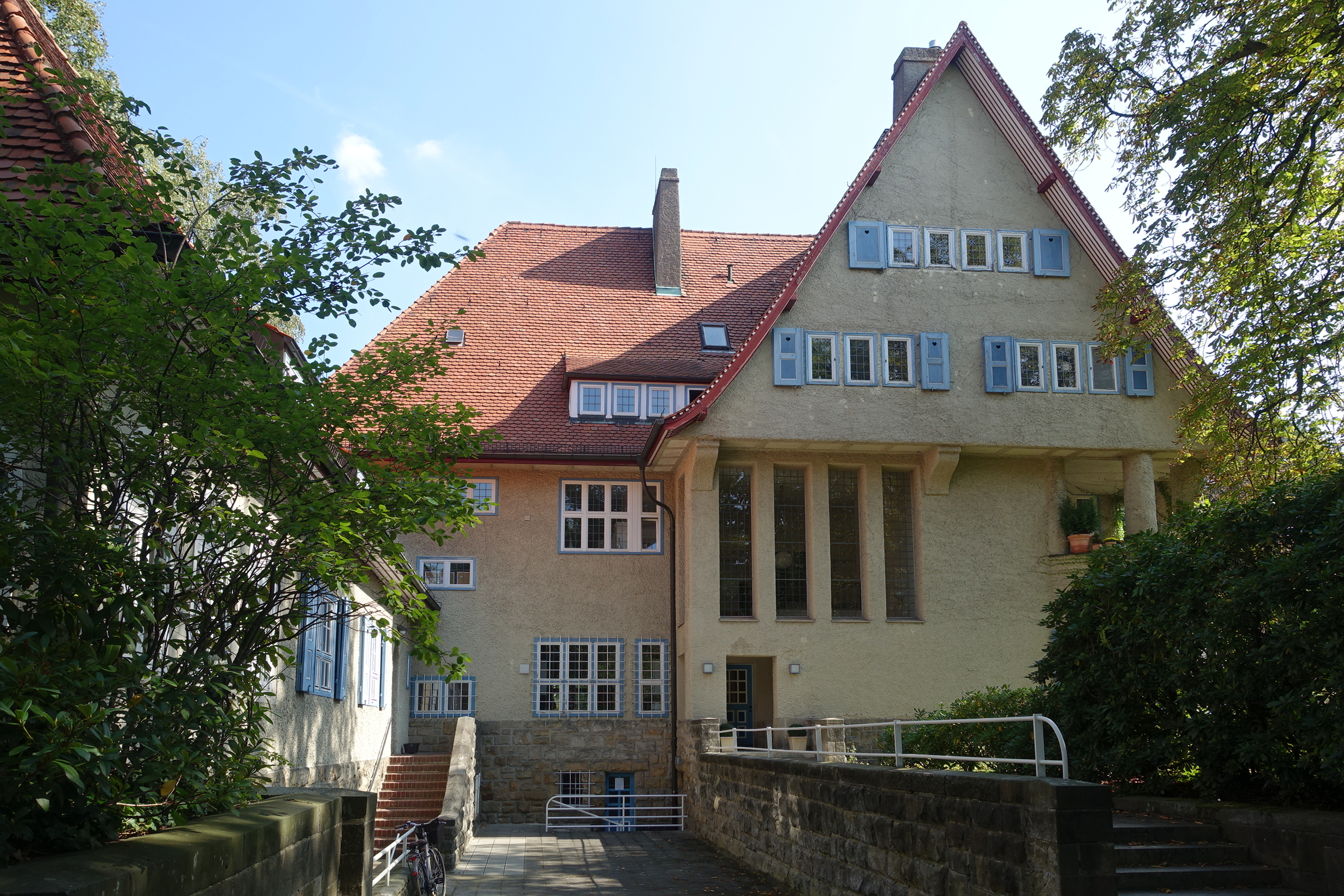 Wohnhaus